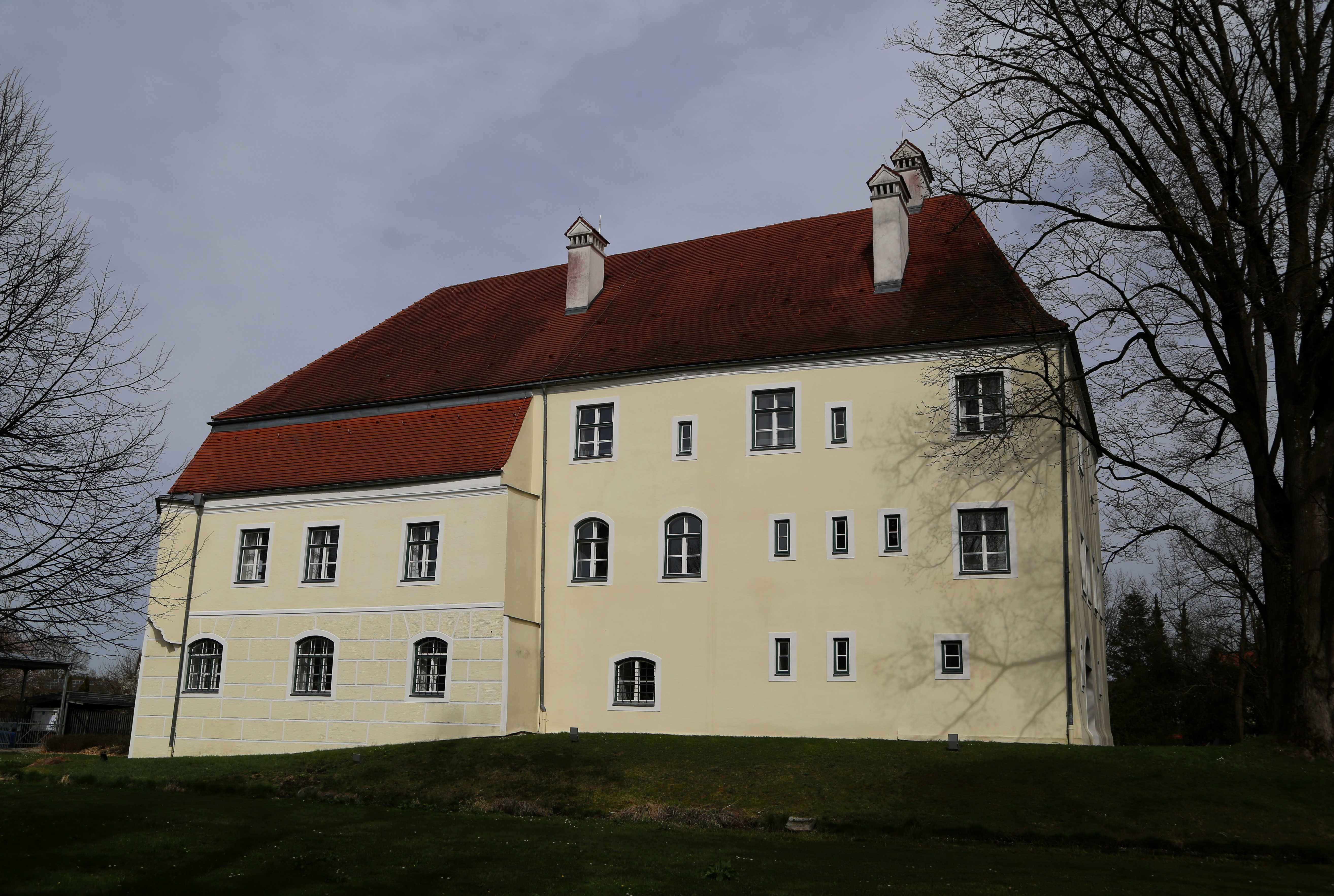 Johannesstraße 9, Neumarkt-Sankt Veit; Schloss Adlstein, ehemaliges Pflegschloss des Gerichts Neumarkt, jetzt Rathaus und Stadtarchiv Stattlicher zweigeschossiger Bau mit Halbwalmdach, an der Nordost- und Nordwestecke Kastenerker über profilierten Konsolen vorkragend Ehemalige Schlosskapelle mit Ausstattung; erbaut 1478 unter Verwendung älterer Bauteile, um 1504 im Landshuter Erbfolgekrieg ausgebrannt, 1509/10 Wiederhaufbau, im 16. und 18. Jahrhundert z. T. baulich verändert Ehemalige Parkanlage